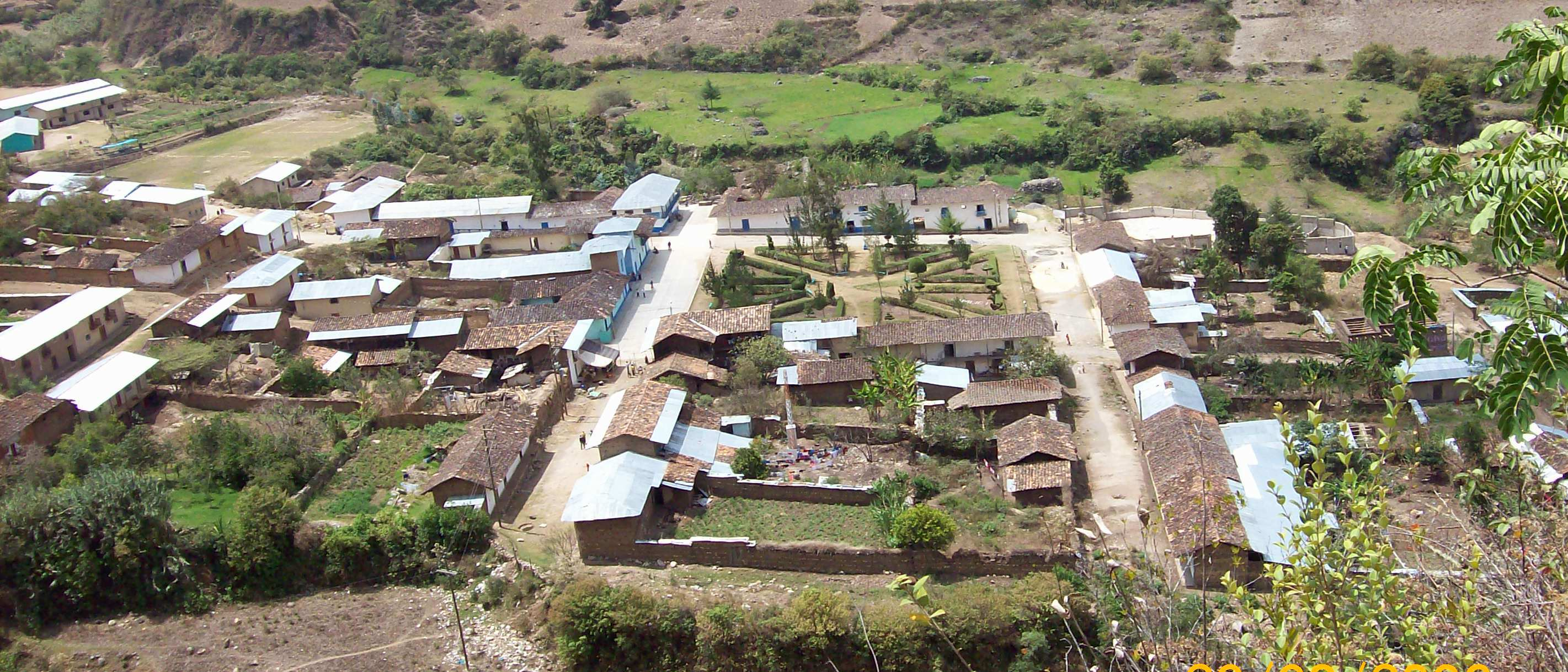 Vista Panoramica